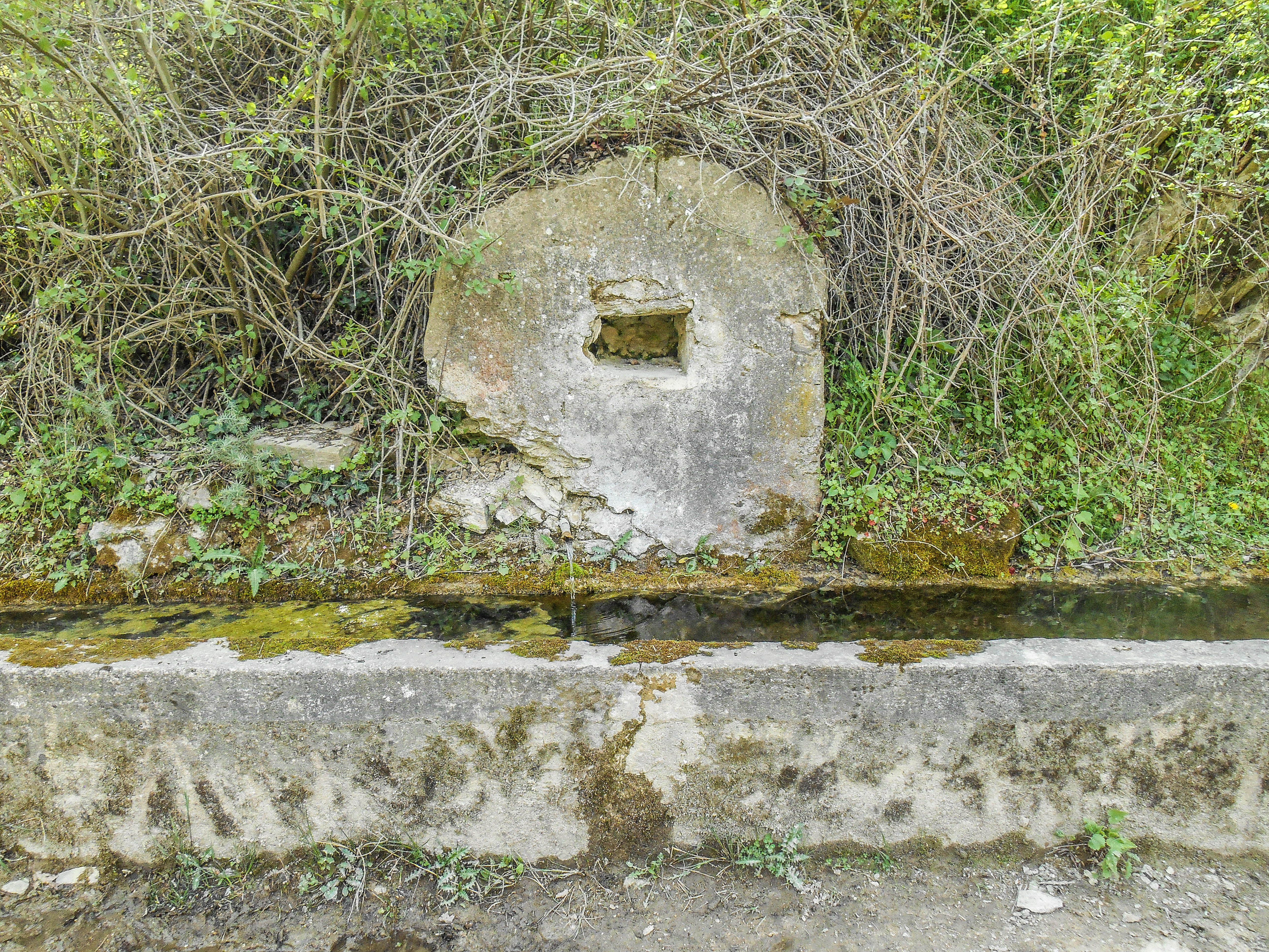 Селска чешма